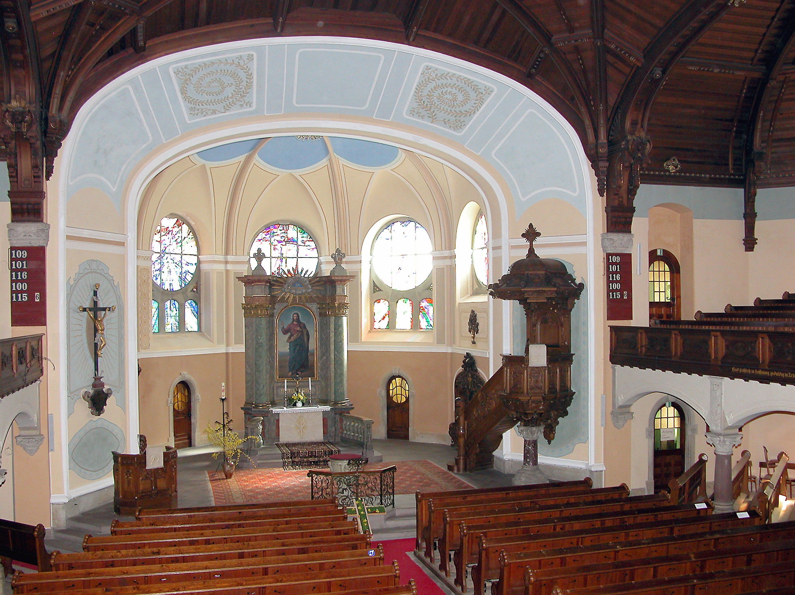 31.03.2005 01187 Dresden-Altplauen, Reckestraße 6 (GMP: 51.028935,13.704658): Ev.-Luth. Auferstehungskirche. 700jährige Vorgeschichte mit vielen Umbauten. Früher hieß sie Michaeliskirche. Nach dem letzten großen Erweiterungsbau erhielt sie 1903 den Namen Auferstehungskirche. Architekten waren William Lossow und Hermann Viehweger. [DSCN6151.TIF]20050331082DR.JPG(c)Blobelt